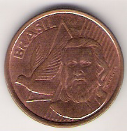 Verso da moeda de 5 centavos da segunda geração. This graphic was created with GIMP.